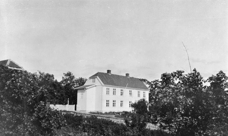 Helsfyr gård, ca. 1890